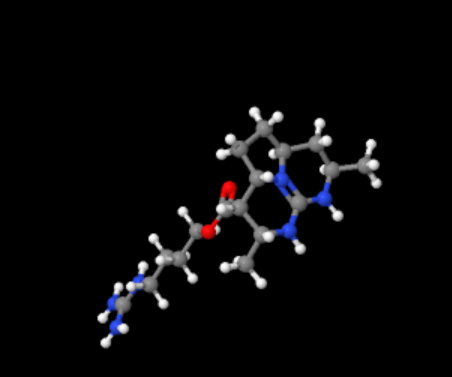 Estructura tridimensional de la batzelladina D